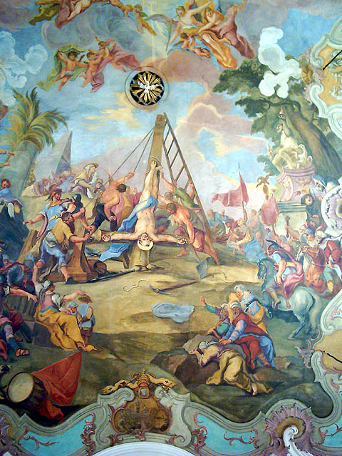 Beratzhausen (Oberpfalz, Bayern): Deckenfresko in der äußerlich unscheinbaren, innen aber überwältigend ausgestatteten katholischen Pfarrkirche St. Peter und Paul Bildautor: Peter Bubenik - Aufnahmedatum: 30.07.2004 - Lizenz: GNU-FDL